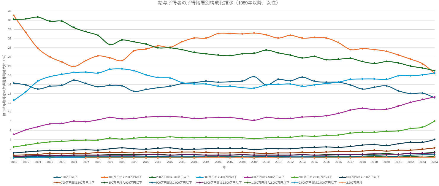 1989年以降の女性給与所得者の所得階層別人数推移